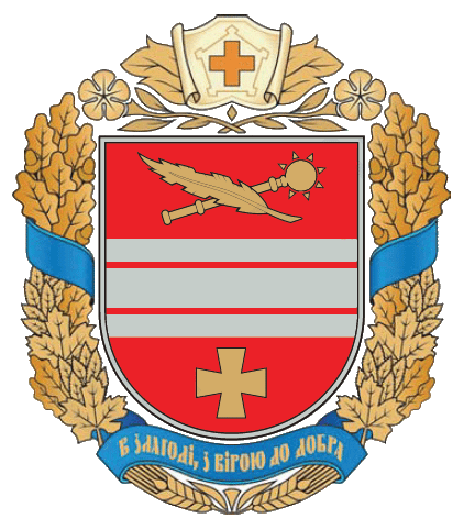 Герб Новоархангельського району Кіровоградської області